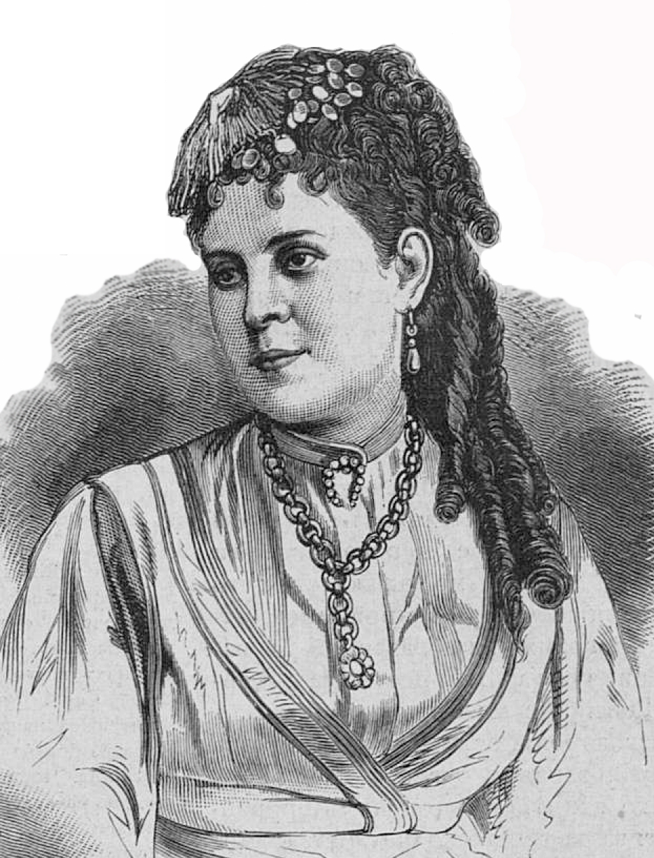 Радина Любовь Петровна - русская балерина, 1876 год